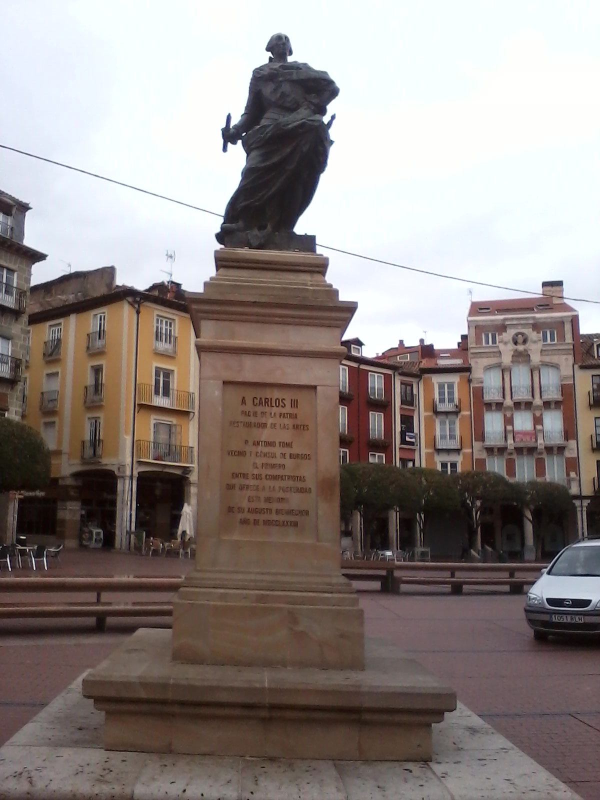 Carlos III ubicado en el centro de la Plaza Mayor de Burgos.